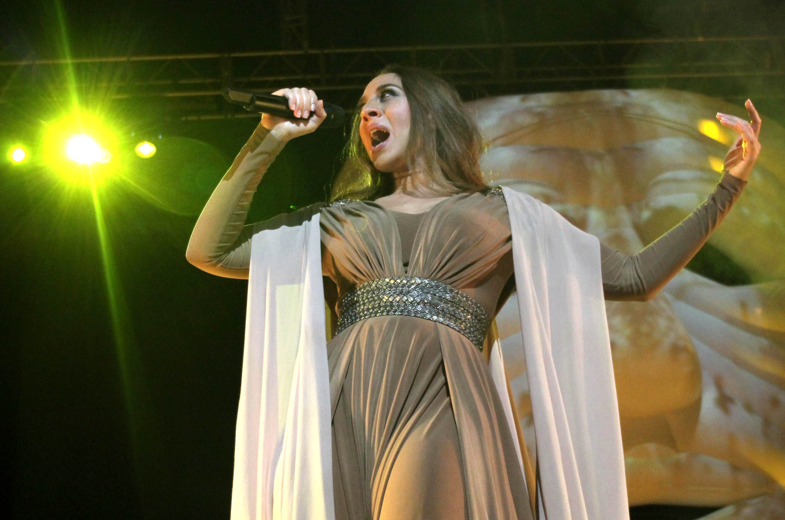 Mónica Naranjo en concierto en Valladolid.